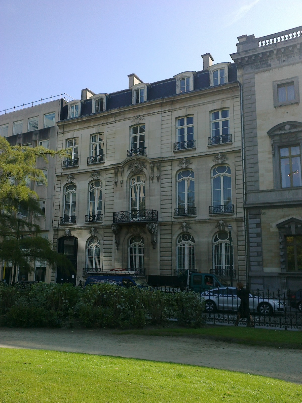 Hôtel Löwenstein, Rue de la Science/Wetenschapsstraat, Brussels. Now part of the complex housing the Council of State